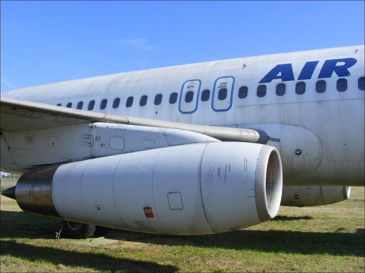 Réacteurs de mercure